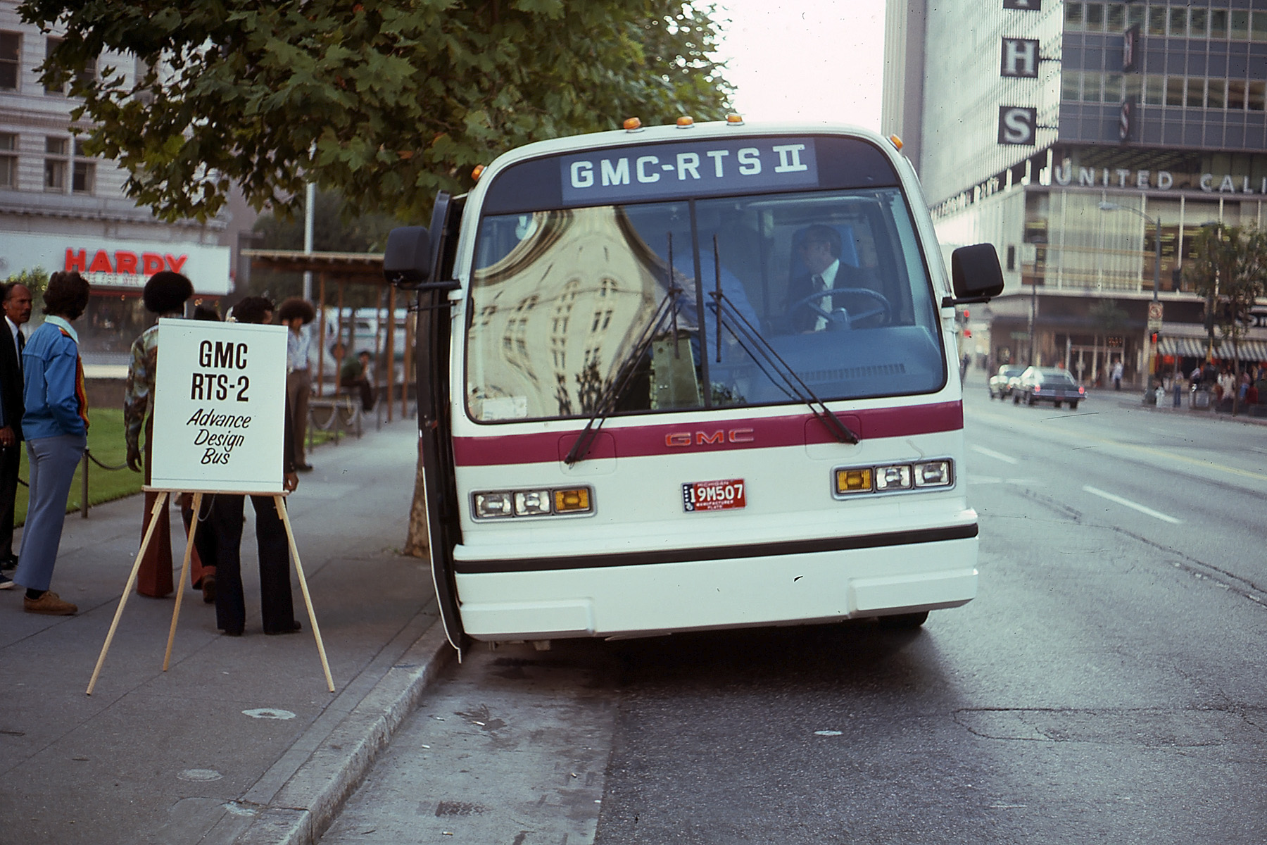 ACT138